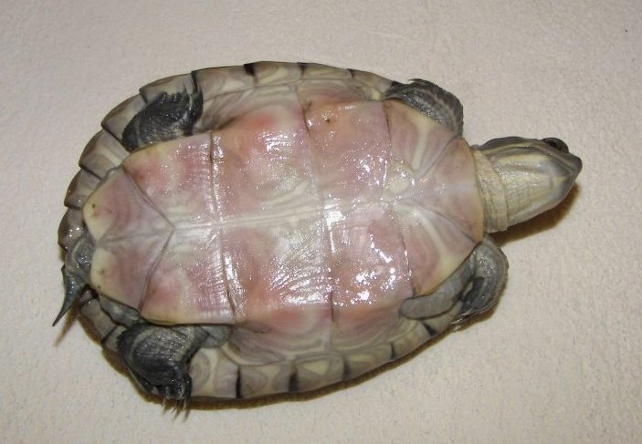 tortue vu d'en dessous